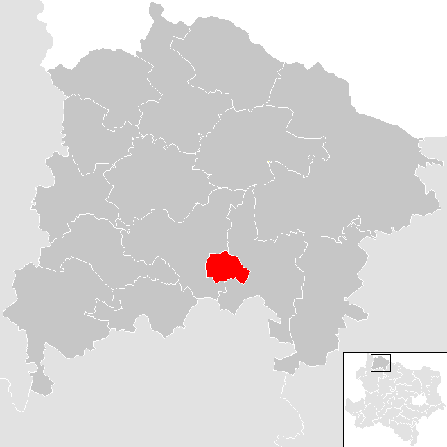 Bezirk Waidhofen an der Thaya